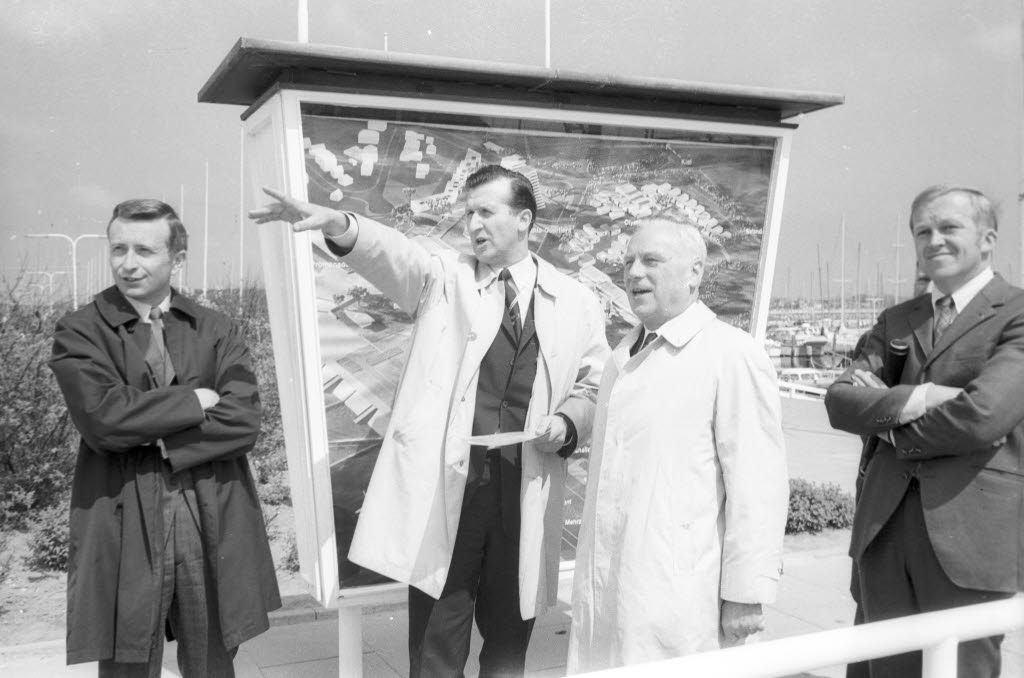 ZDF-Intendant Prof. Karl Holzamer (2. v.r.) lässt sich von Oberbürgermeister Günther Bantzer das Areal des Olympiazentrums Schilksee erläutern. Links Pressesprecher Werner Istel.